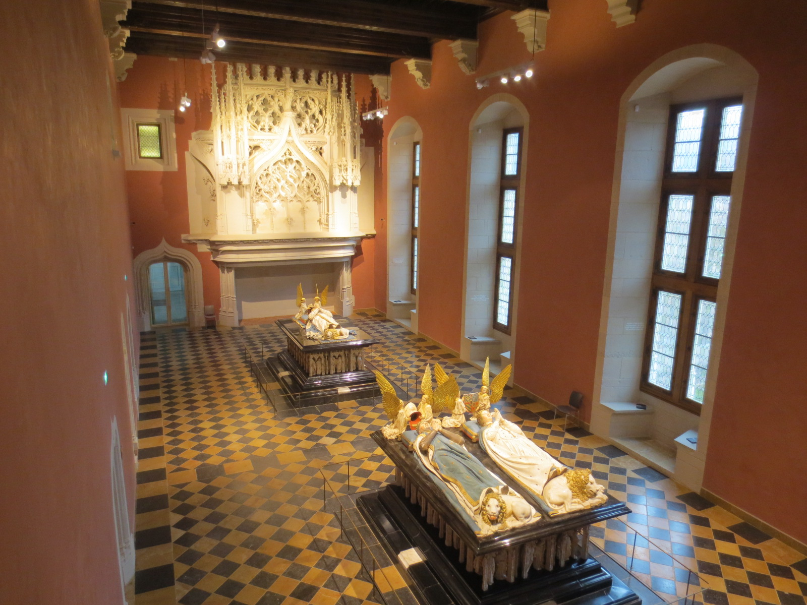 Tombeaux des Ducs de Bourgogne